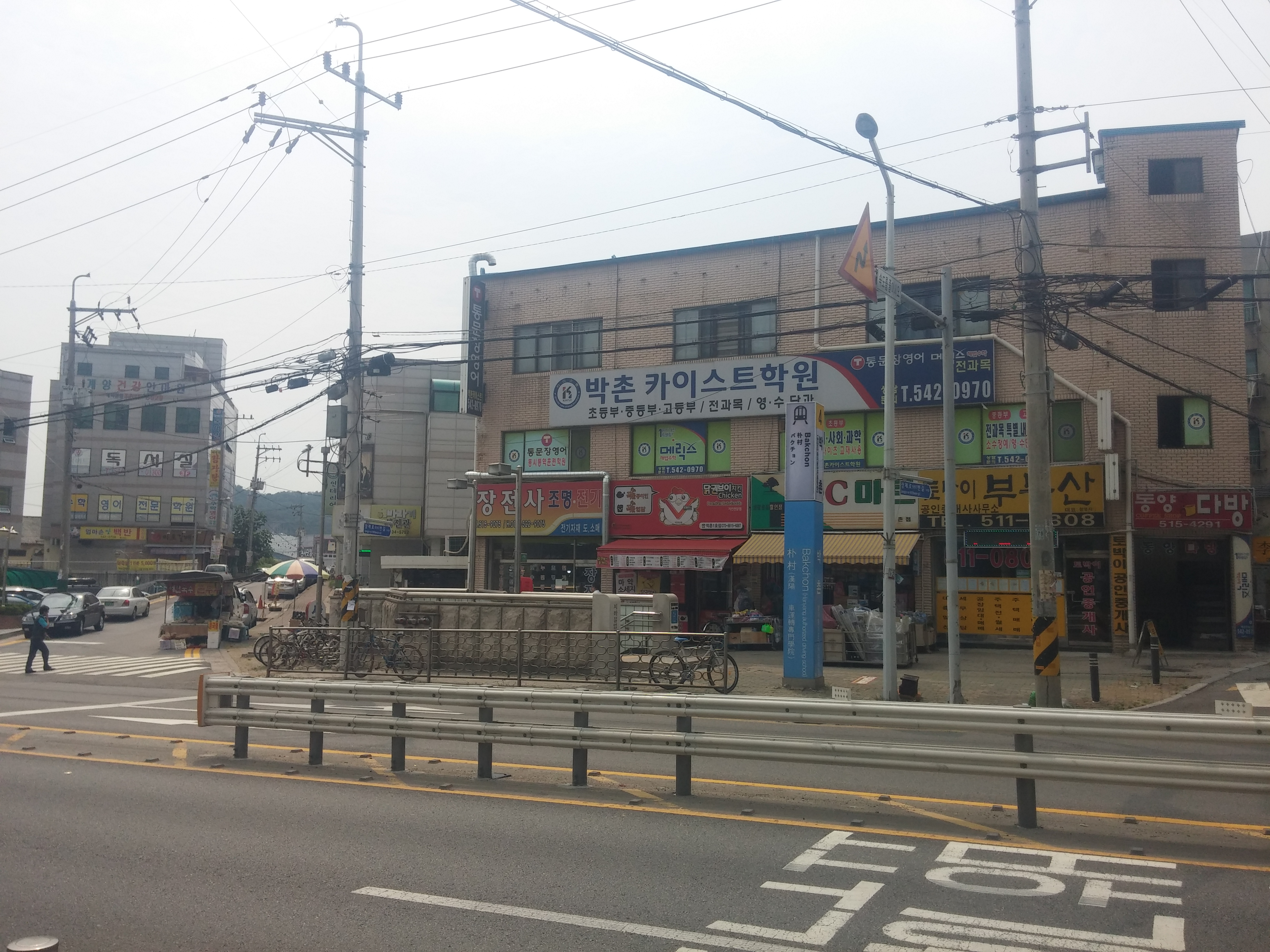 박촌역 4번 출구